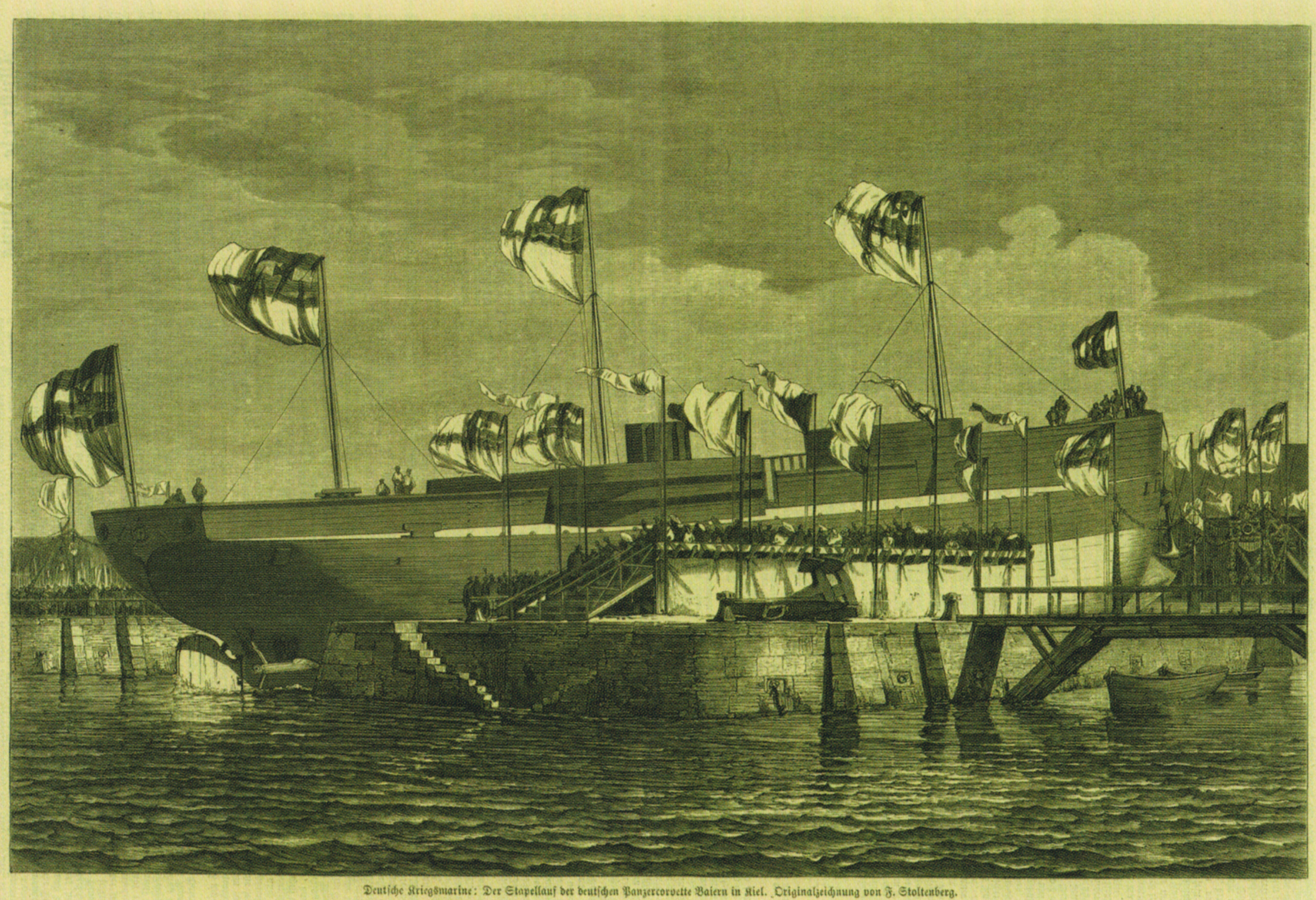 Der Stapellauf der Panzercorvette Bayern in Kiel , Holzstich und Zeitschriftenillustration von Fritz Stoltenberg